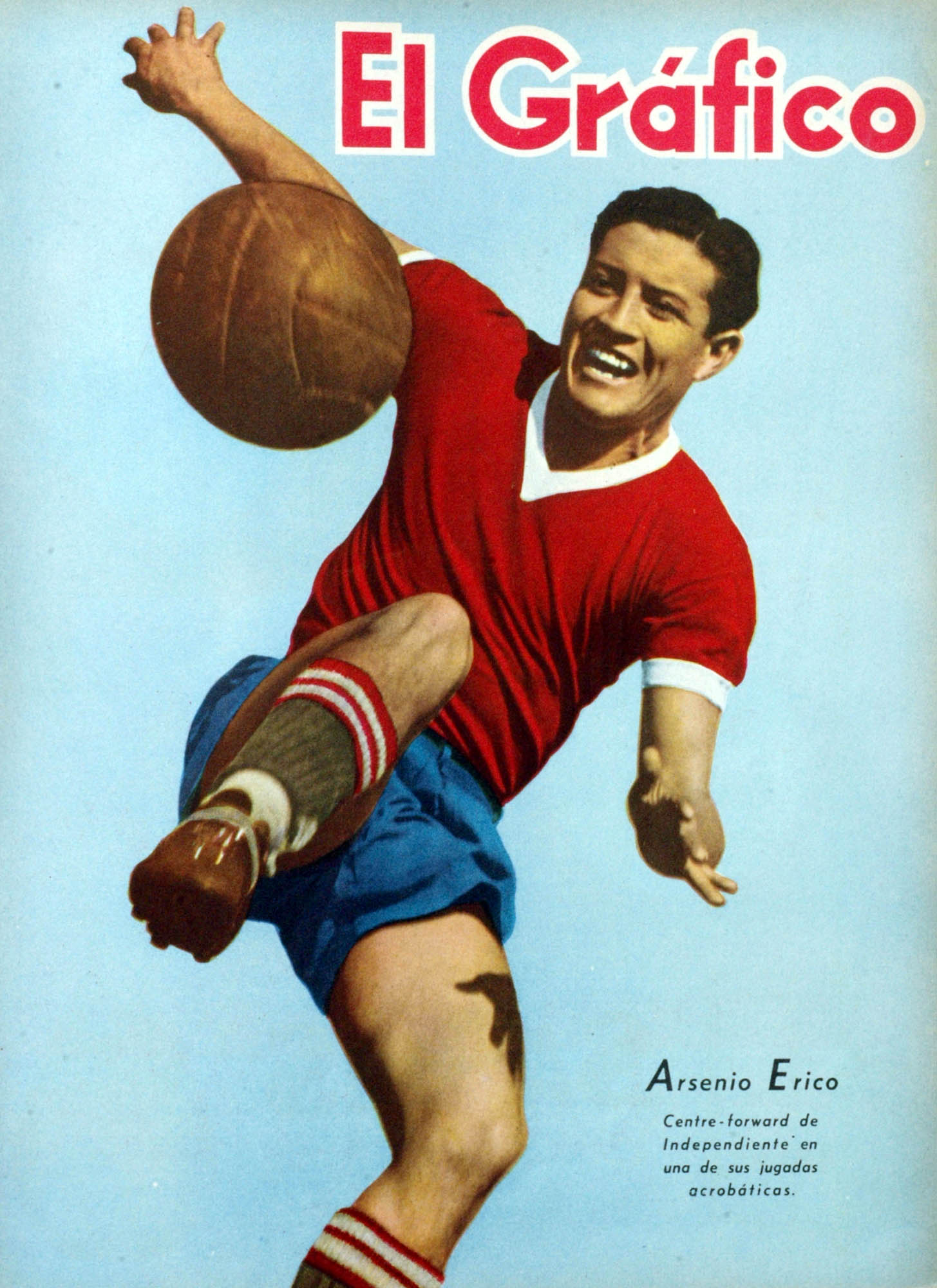 El Grafico del 17 de Abril de 1942. Edicion 1188